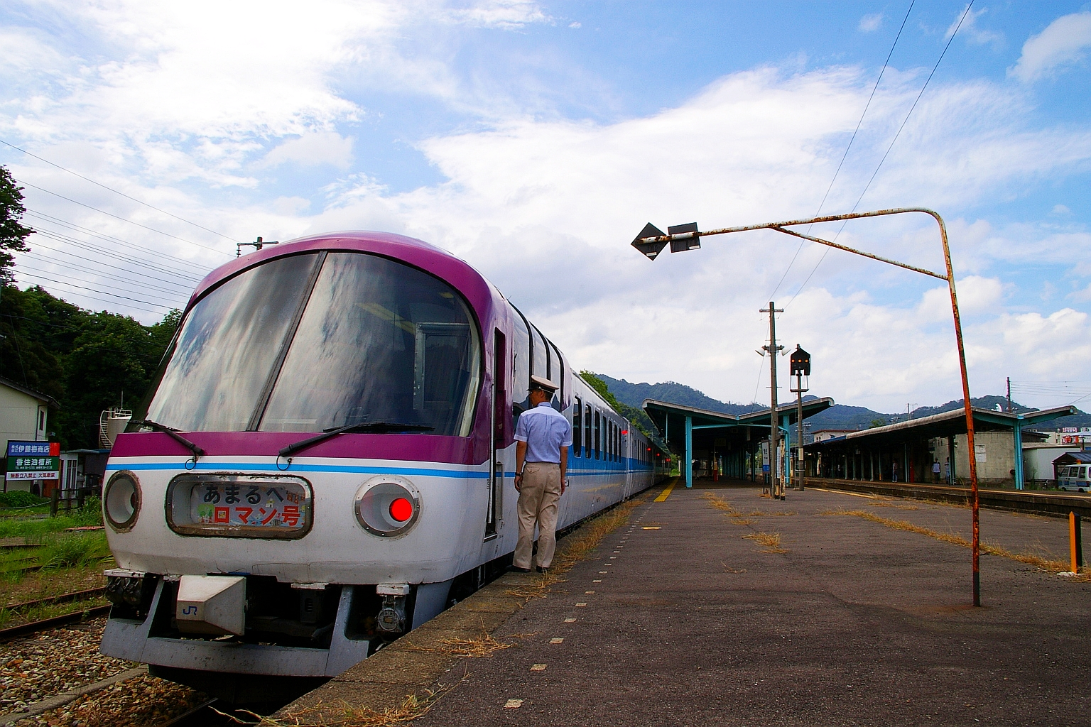 Kasumi sta. -- JR-WEST Sanin Line